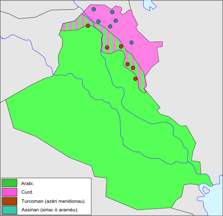 Lengas principalas d'Iraq.